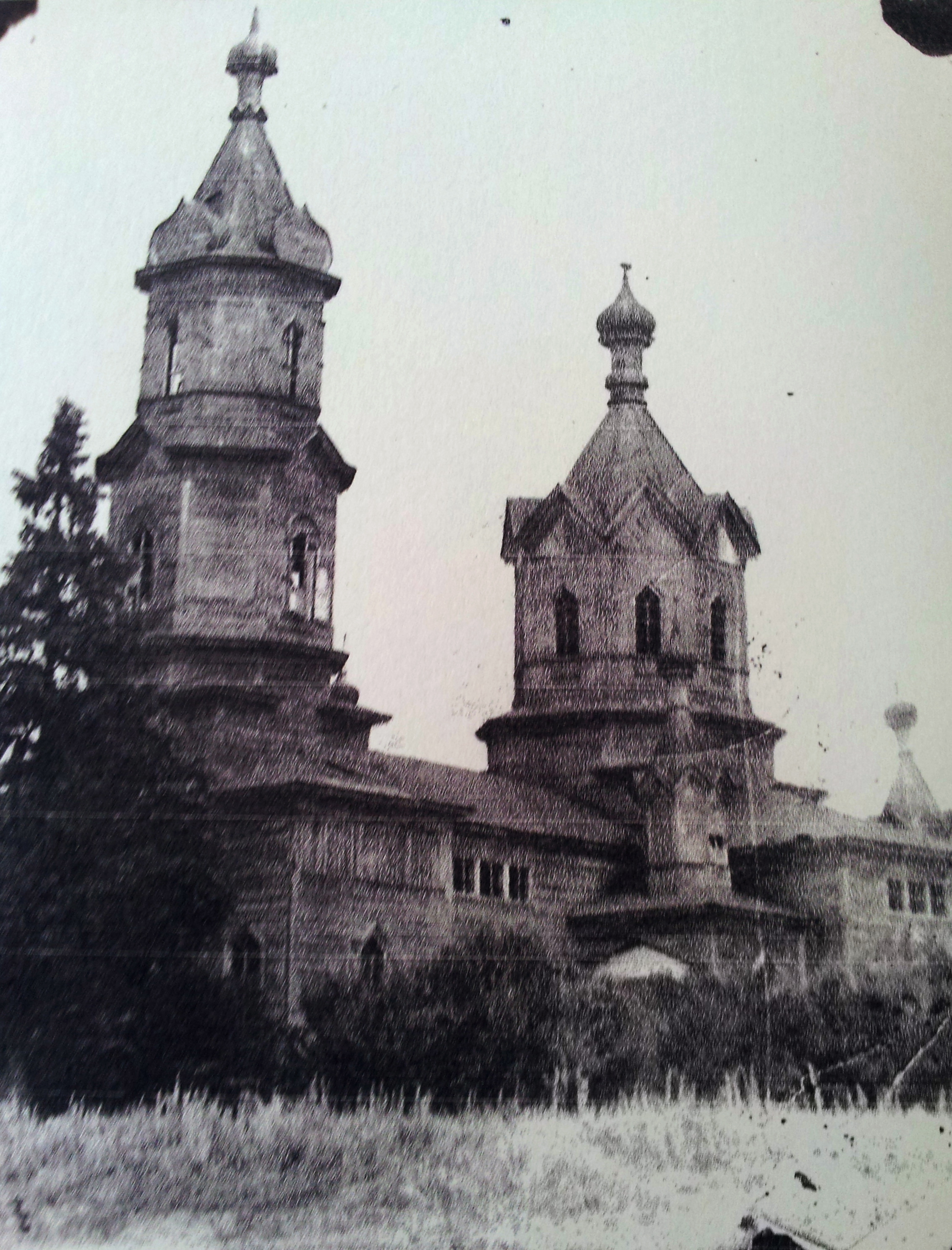 Деревянная Вознесенская церковь в селе Костобоброво, которая была сожжена коммунистами во время существования Советского Союза